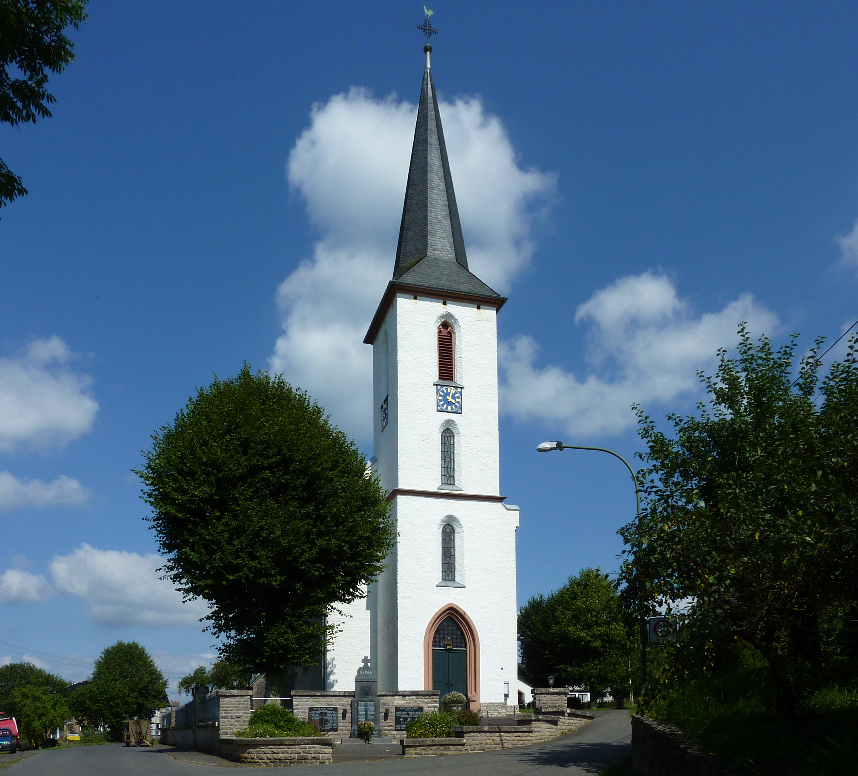 Rohr, Wendelinusstr. 1; kath. Pfarrkirche 1, von W